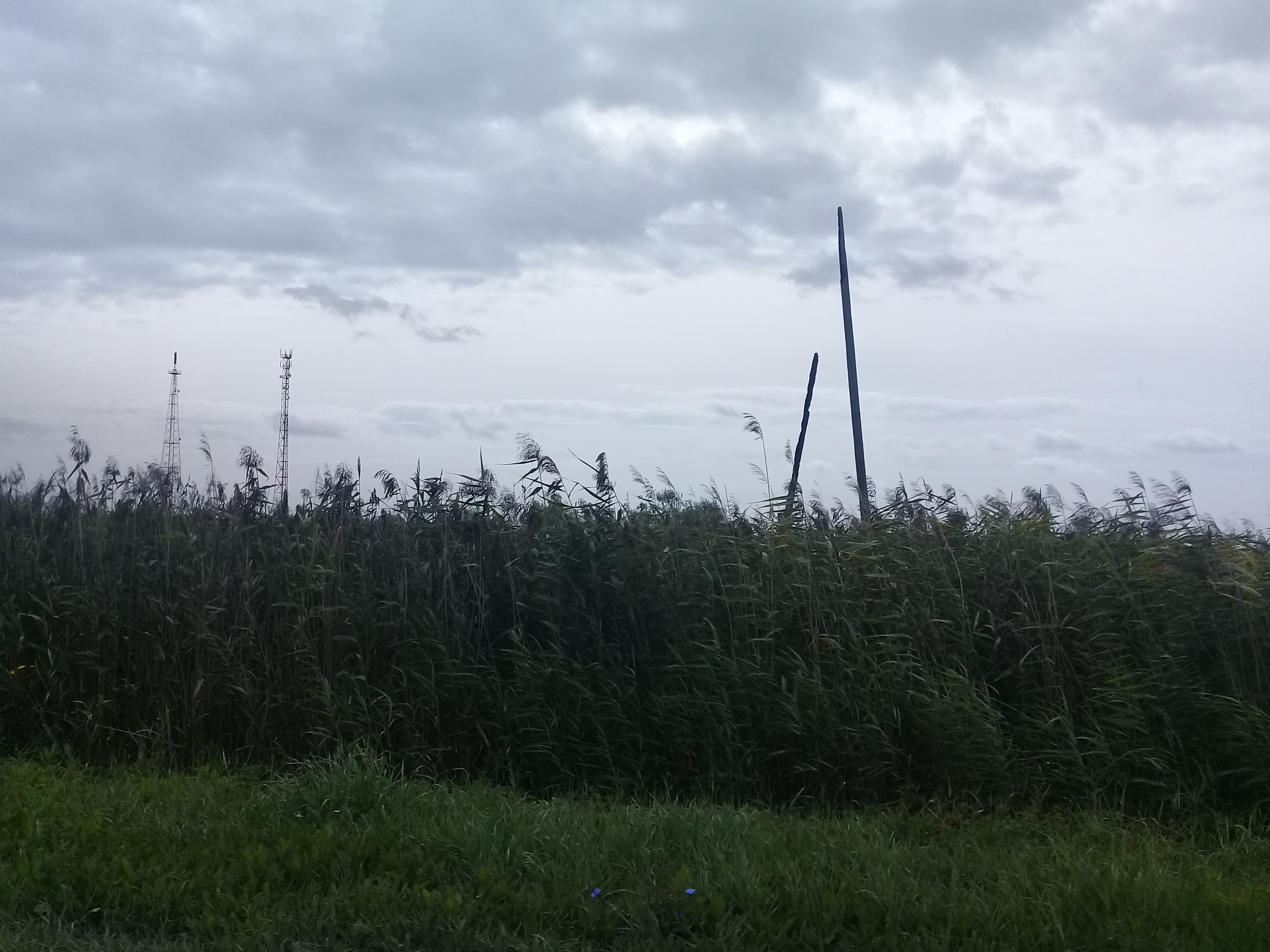 Болото в п. Добринка